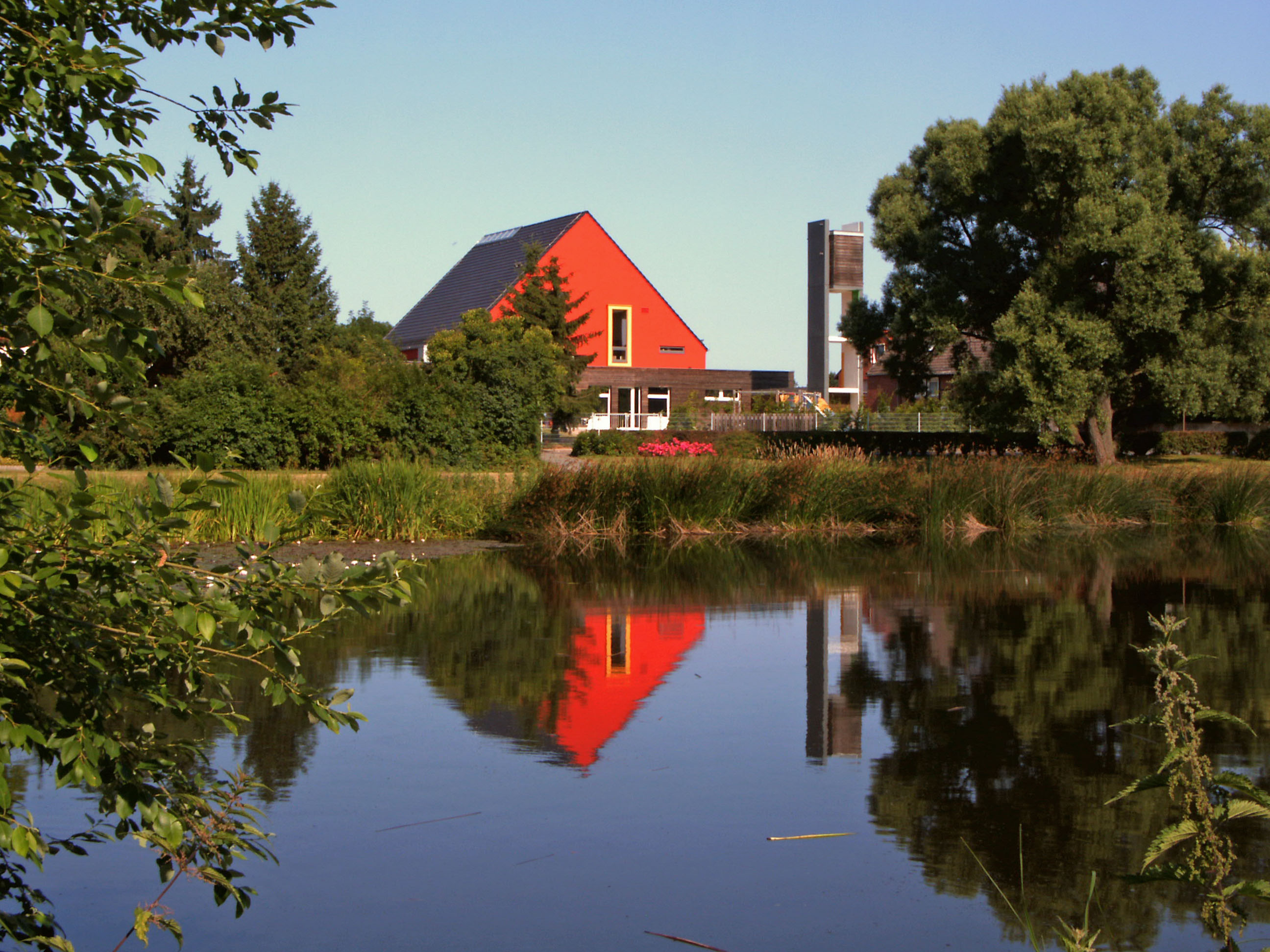 Teich und Kindergarten in Stederdorf, Stadtteil von Peine (in ehemaliger katholischer Kirche).